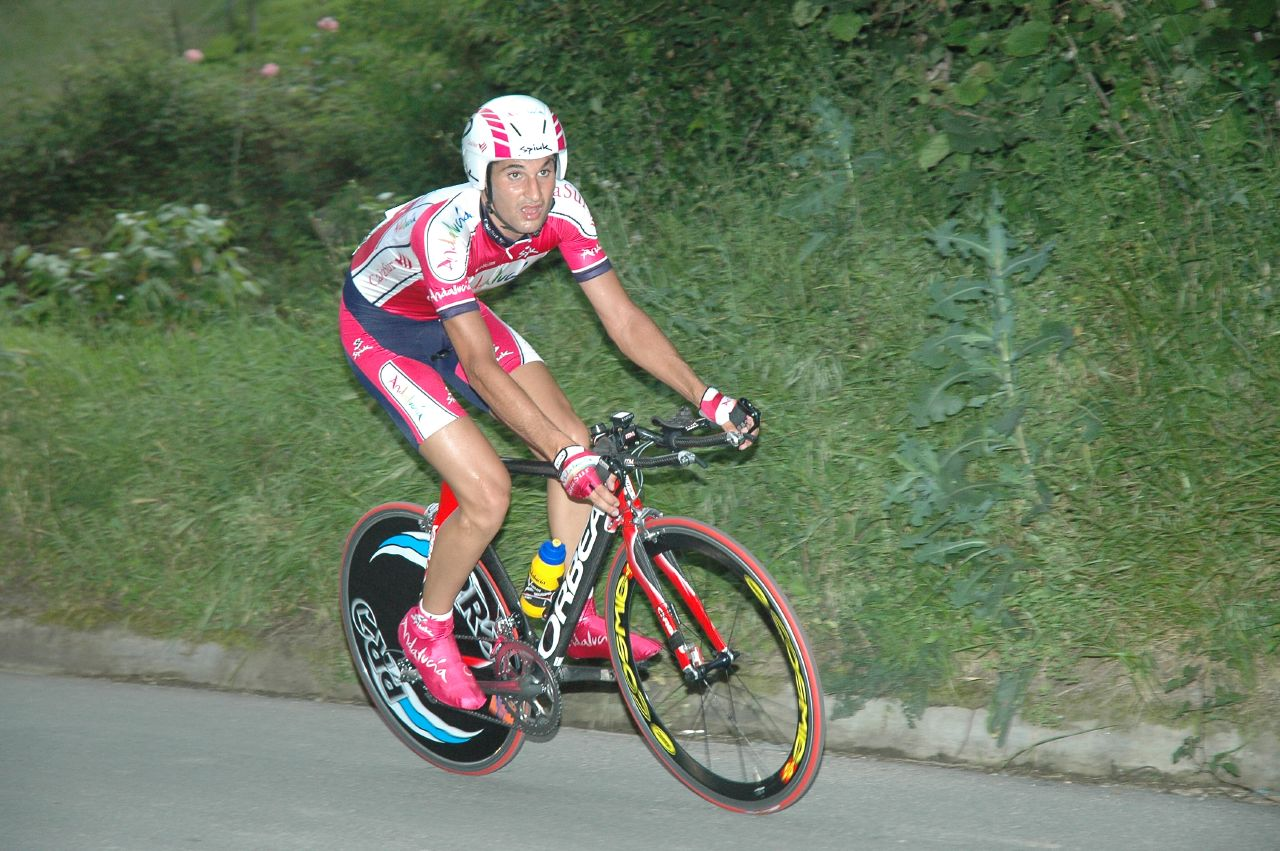 Juan Carlos Cariñena, Euskal Bizikleta 2007